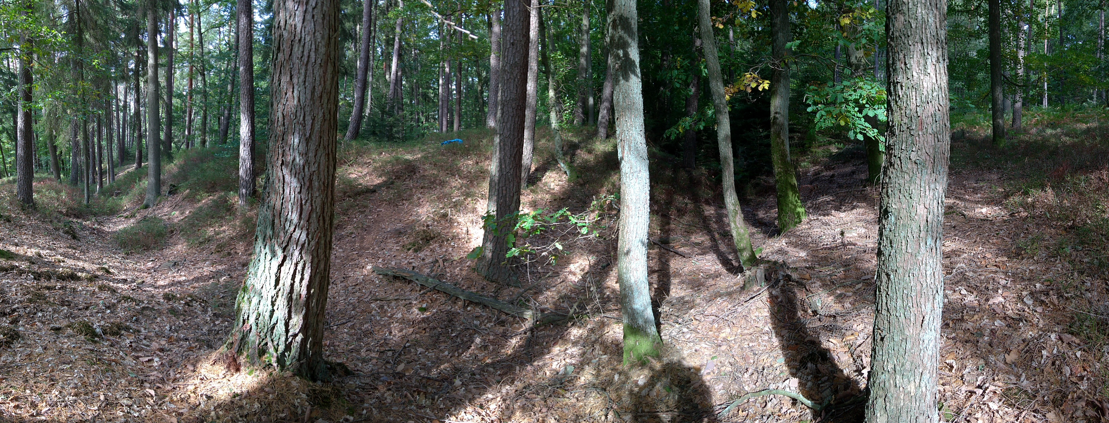 Am Erdwerk Ohrenbacher Schanze: Südostecke vom vorgelagerten kleineren Wall